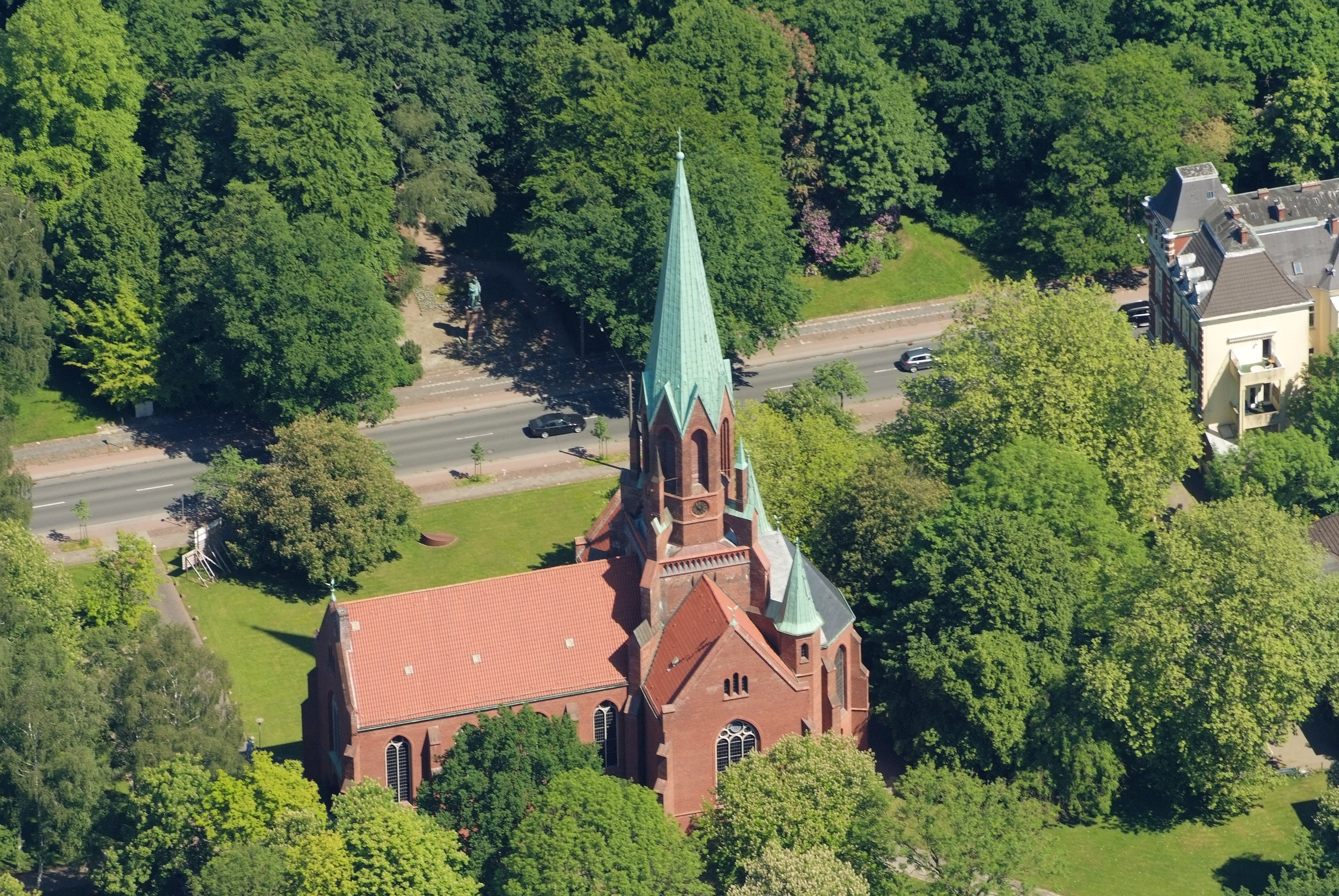 Christus- und Garnisonkirche in Wilhelmshaven, im Hintergrund das Kaiser-Wilhelm-Denkmal Fotoflug vom Flugplatz Nordholz-Spieka über Cuxhaven und Wilhelmshaven